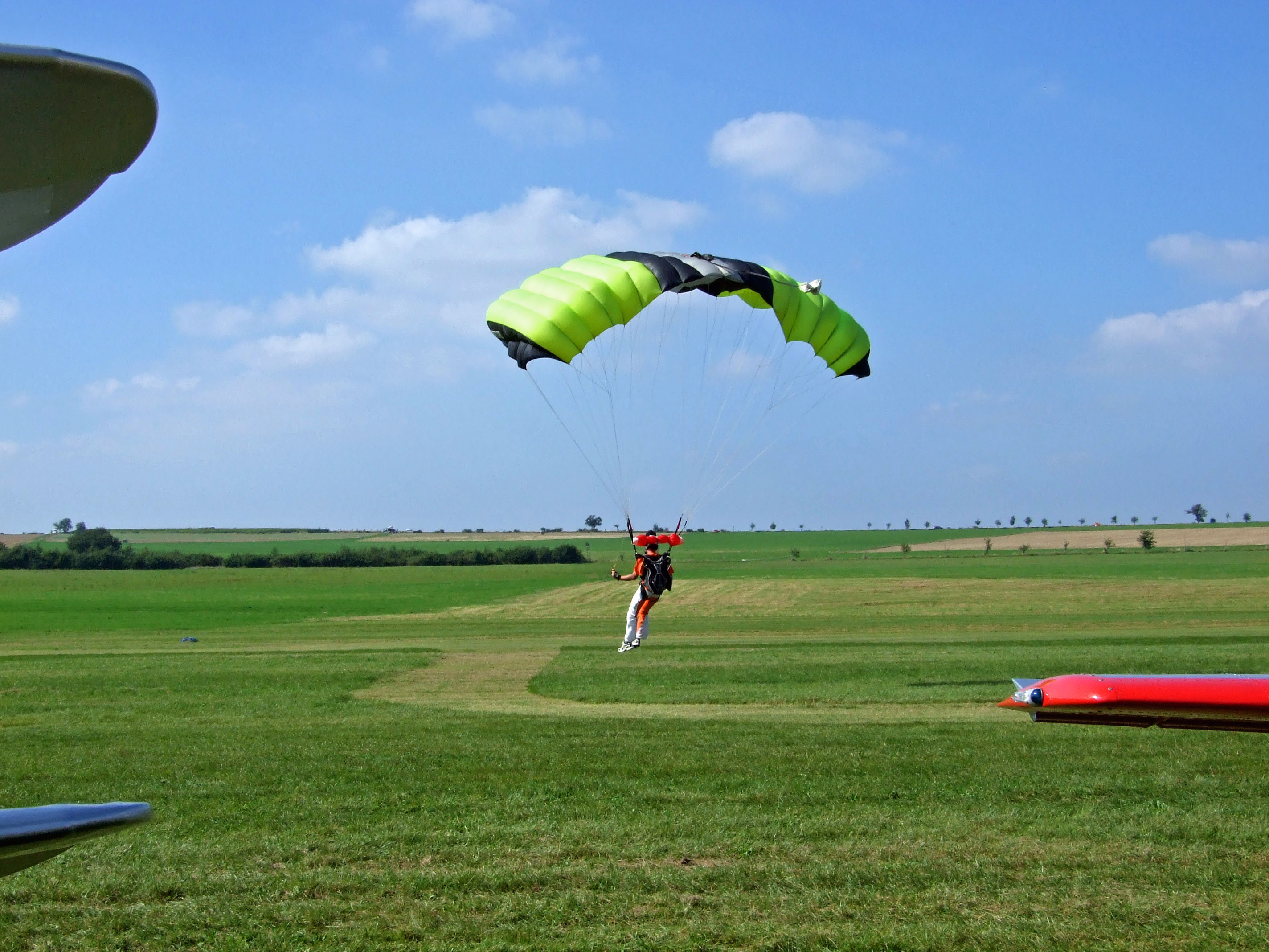 Der Springer mit der Kopfkamera landet zuerst. Taunus Flugfest 2007, auf dem Flugplatz Anspach im Taunus